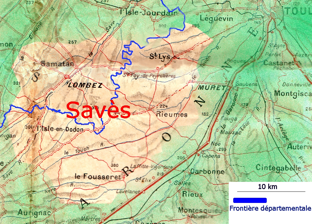 Plan de l'occupation territoriale du Savès, à cheval sur la Haute Garonne et le Gers.La carte initiale est scannée à partir d'une carte routère distribuée gratuitement en 1930 par la dépêche du midi et éditée par de Dion Bouton. Bouchard.daniel 15:55, 6 December 2006 (UTC)